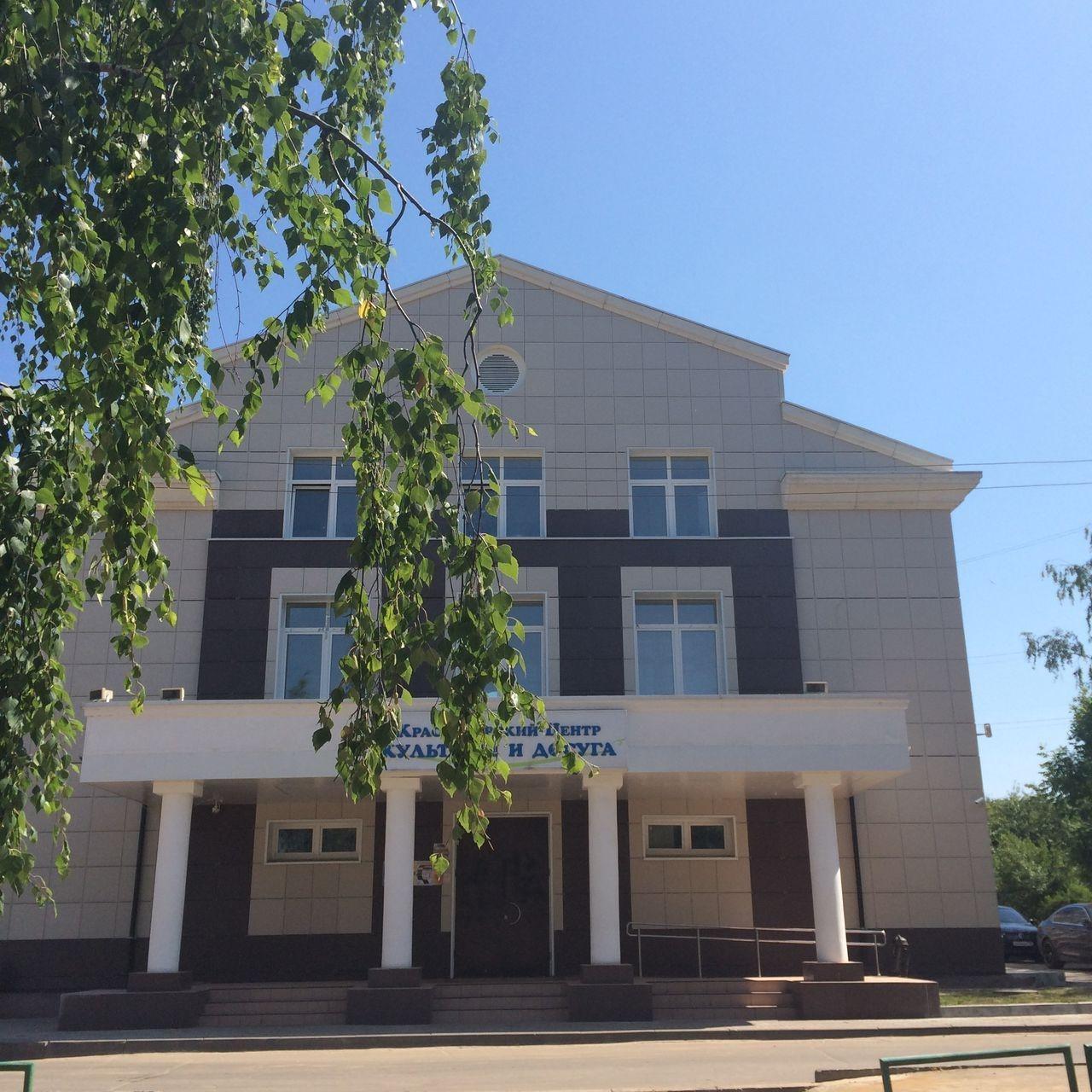 ДК "Опалиха"